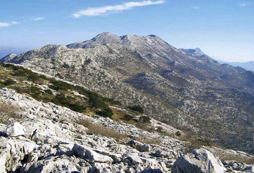 Veliki Kabal, nejvyšší hora pohoří Mosor